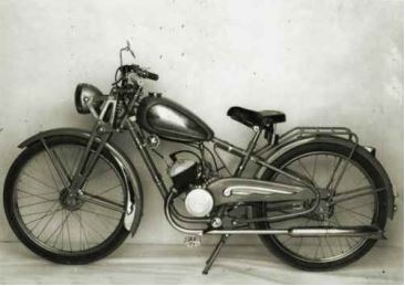 Moto Puma. Primera Serie